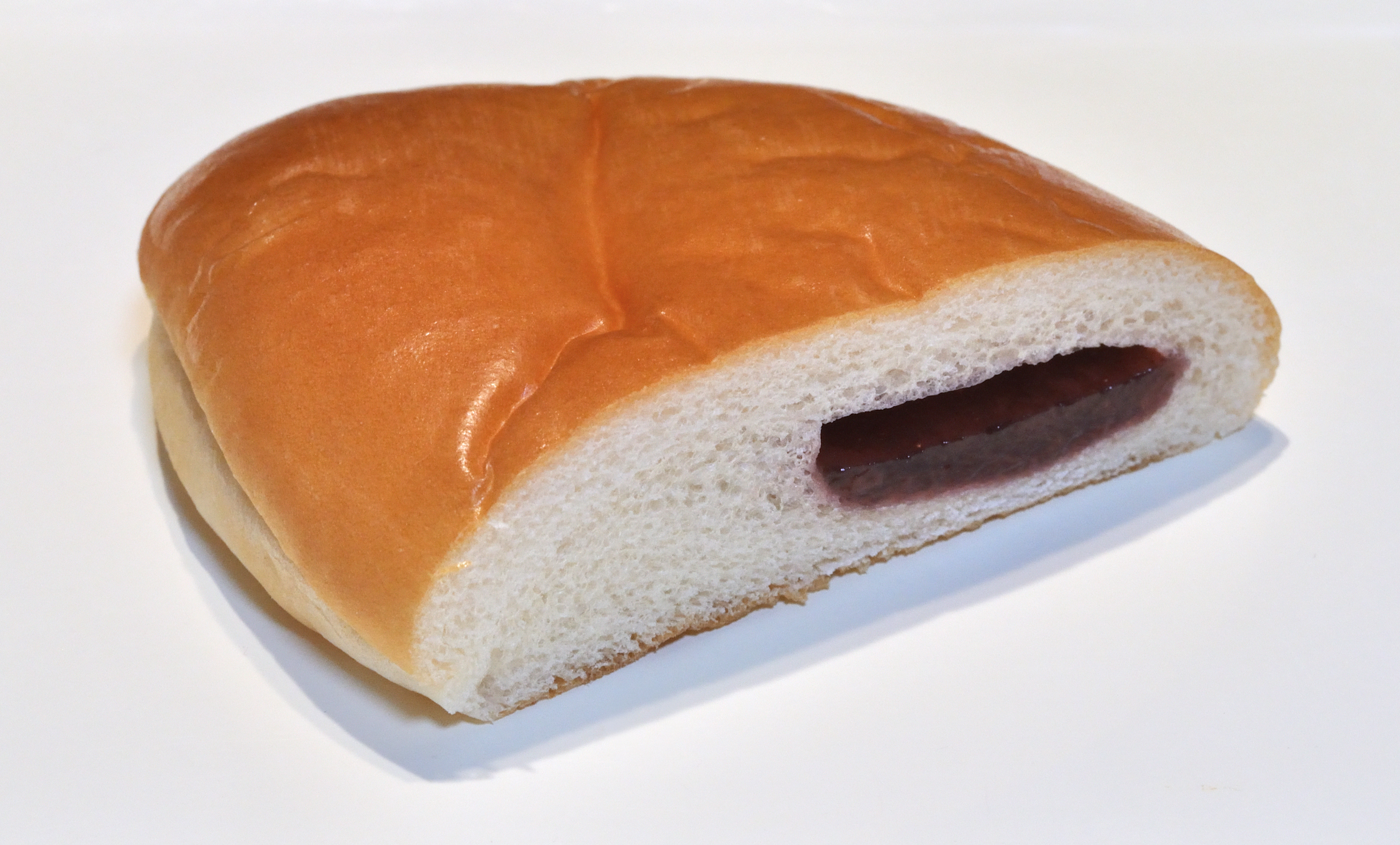 ヤマザキのジャムパン